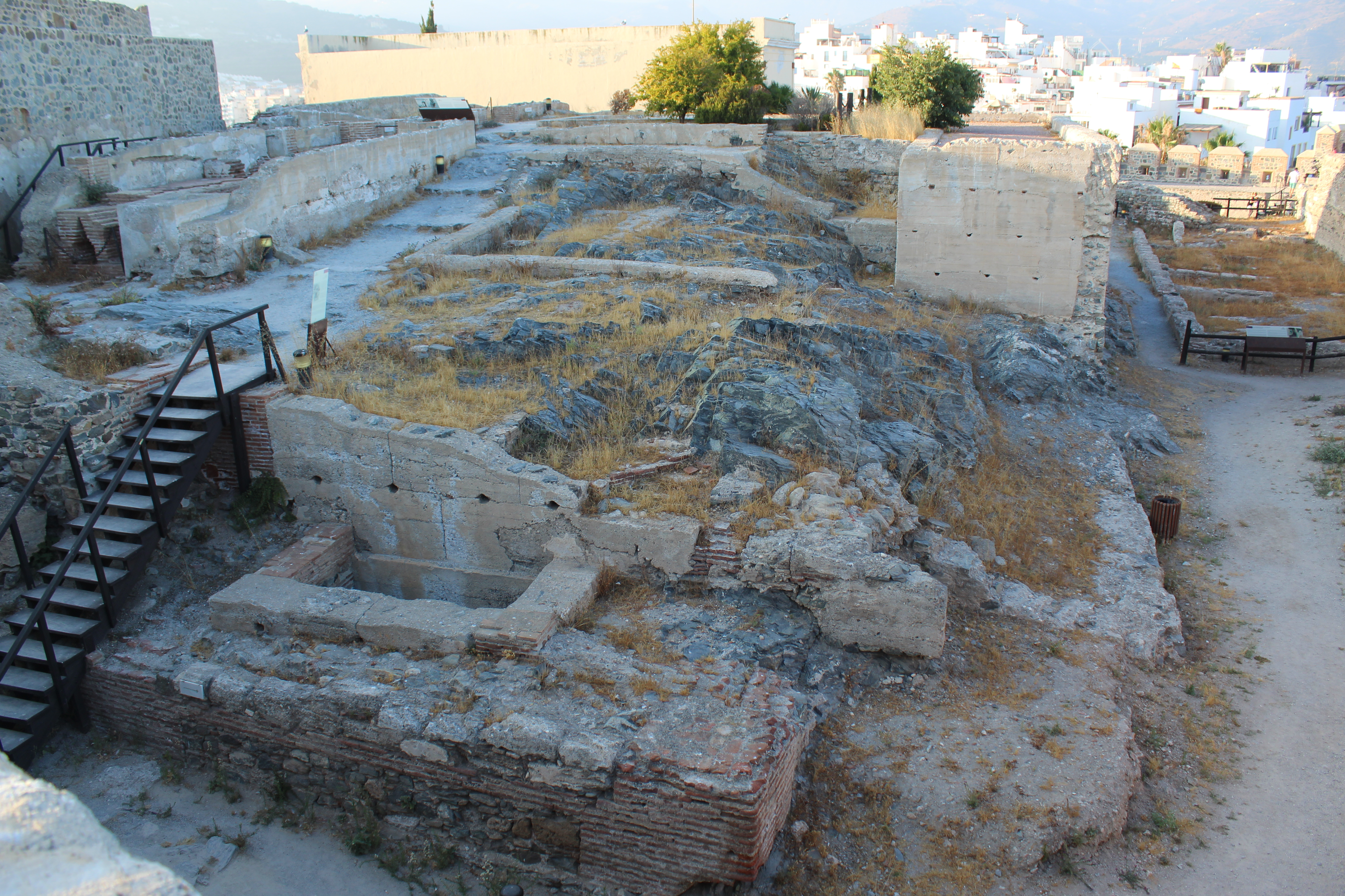 Detalle del interior del castillo de San Miguel, Almuñécar.